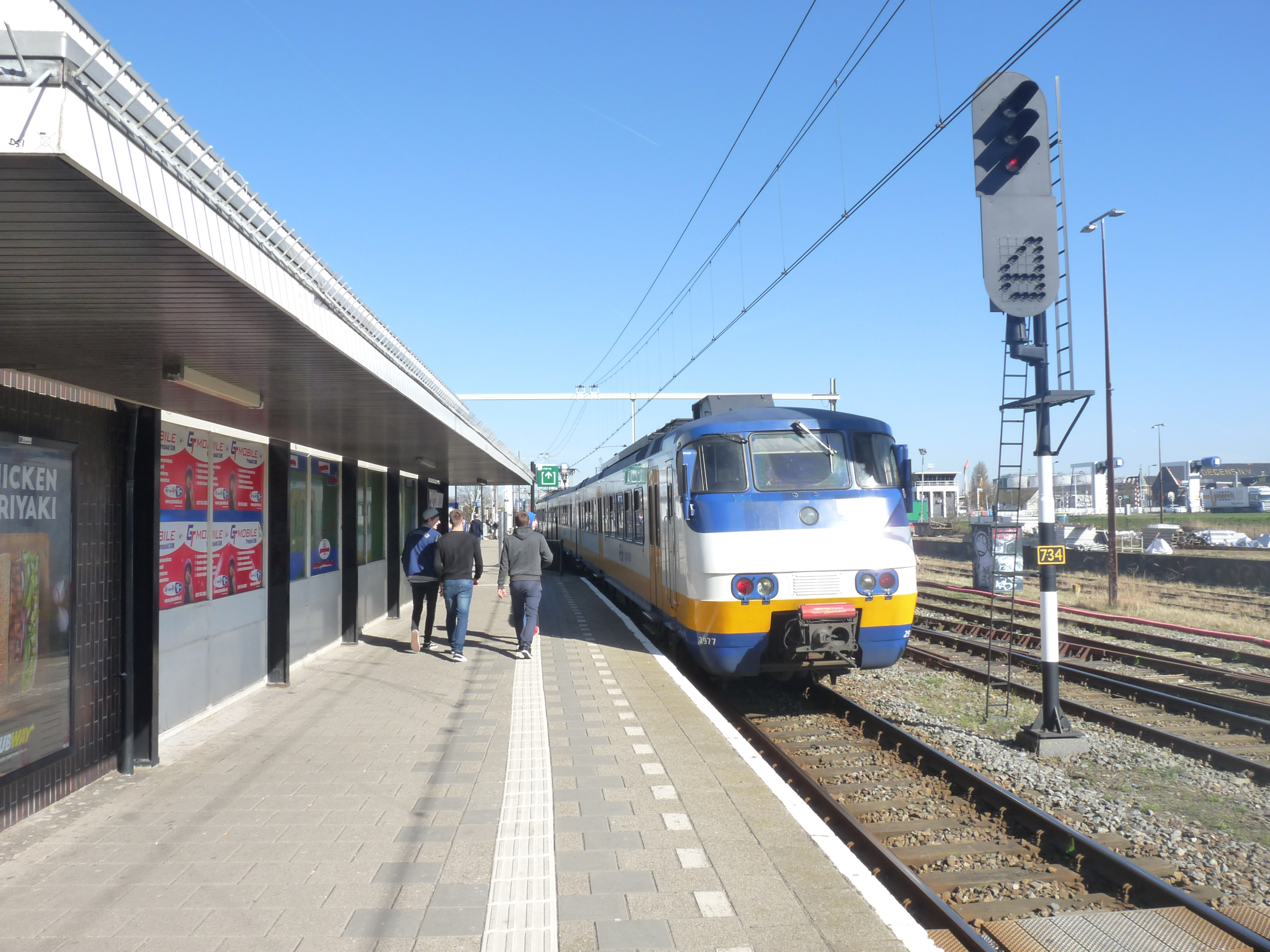 Een SGM in Vlaardingen Centrum